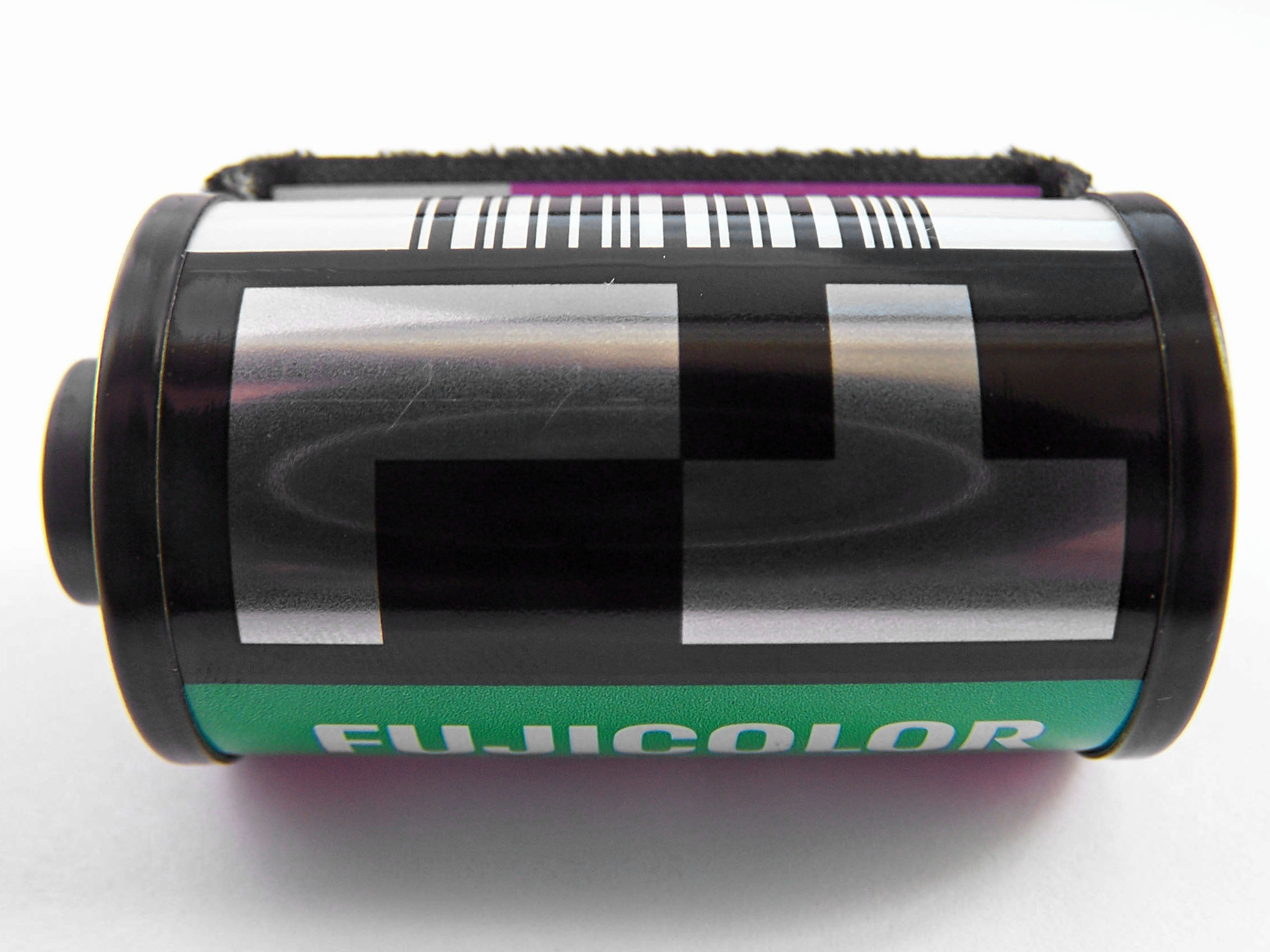 Kod DX - czułość filmu 200 ISO, 36 klatek